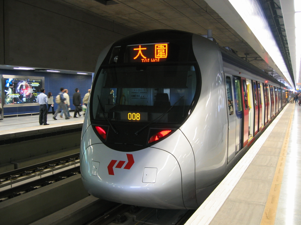 馬鐵採用的SP1950型電車